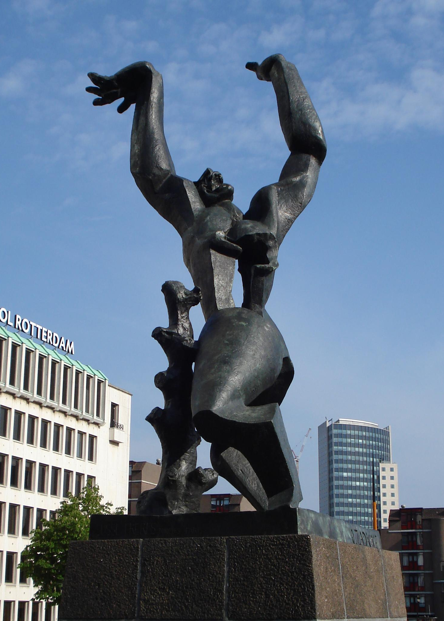 Rotterdam, Zadkine monument. Voorgedragen als rijksmonument, oktober 2007.